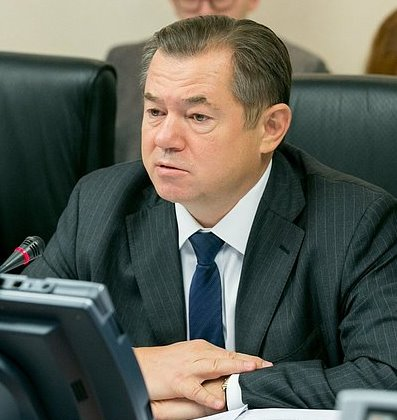 Сергей Юрьевич Глазьев (род.1961) — российский экономист